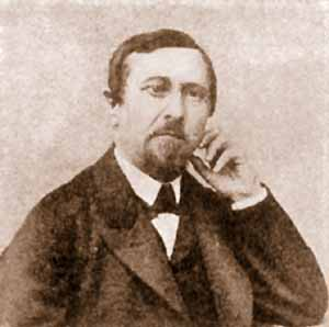 Кесслер, Карл Фёдорович